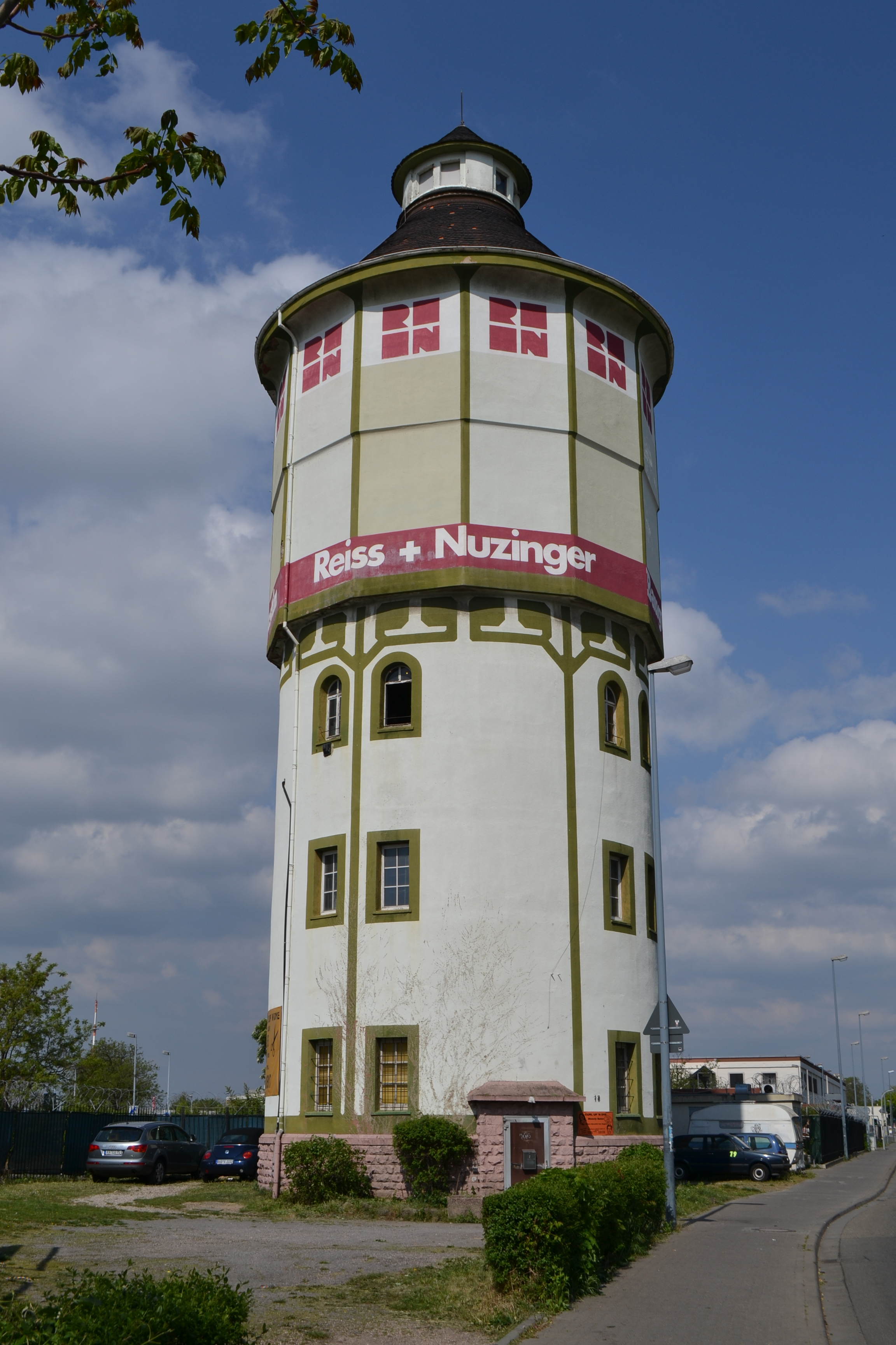 Stillgelegter Wasserturm am Czernyring, Heidelberg